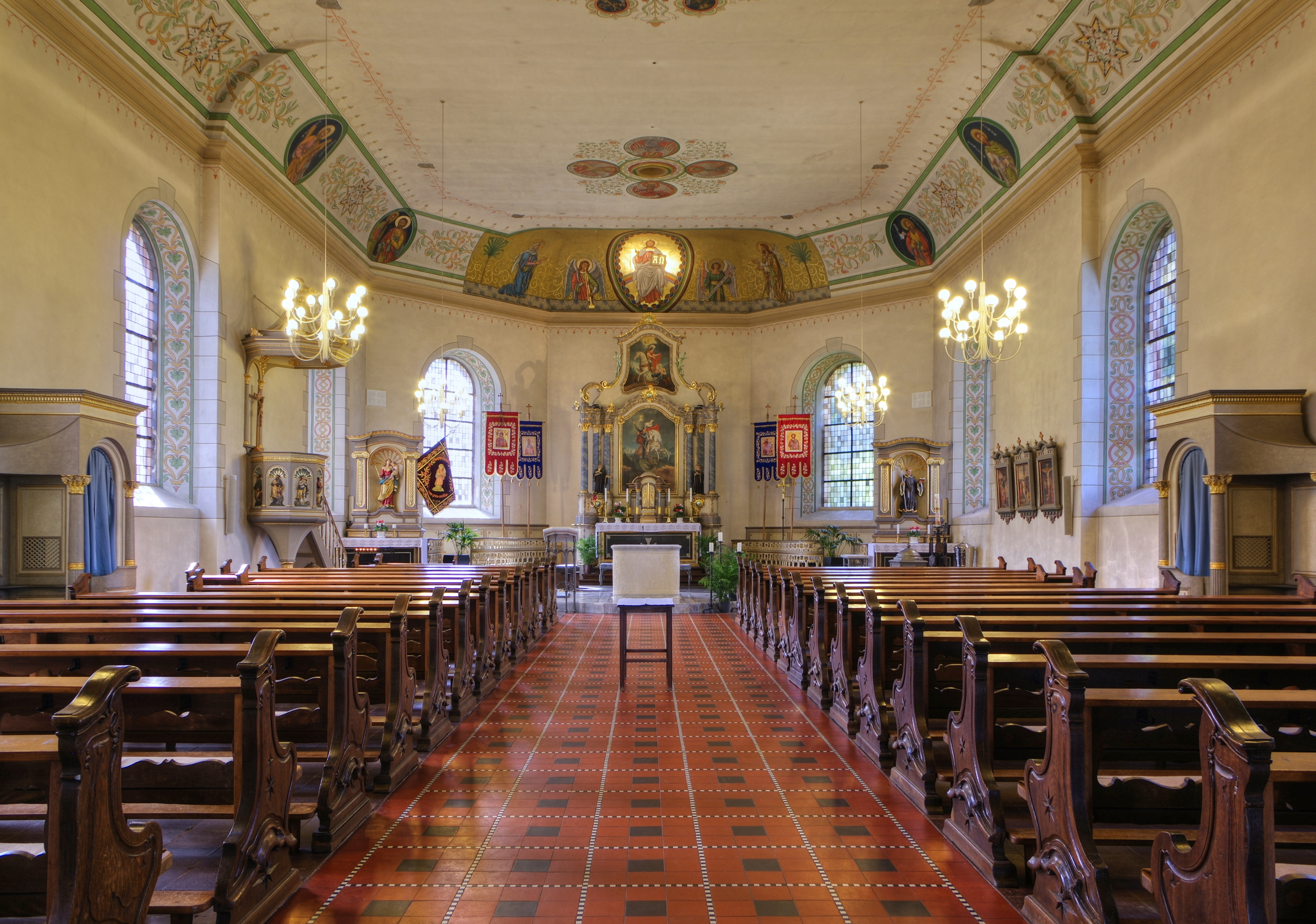 Trier Irsch, Katholische Pfarrkirche St. Georg und St. Wendelinus, Propstei 2, , Liste_der_Kulturdenkmäler_in_Trier-Irsch